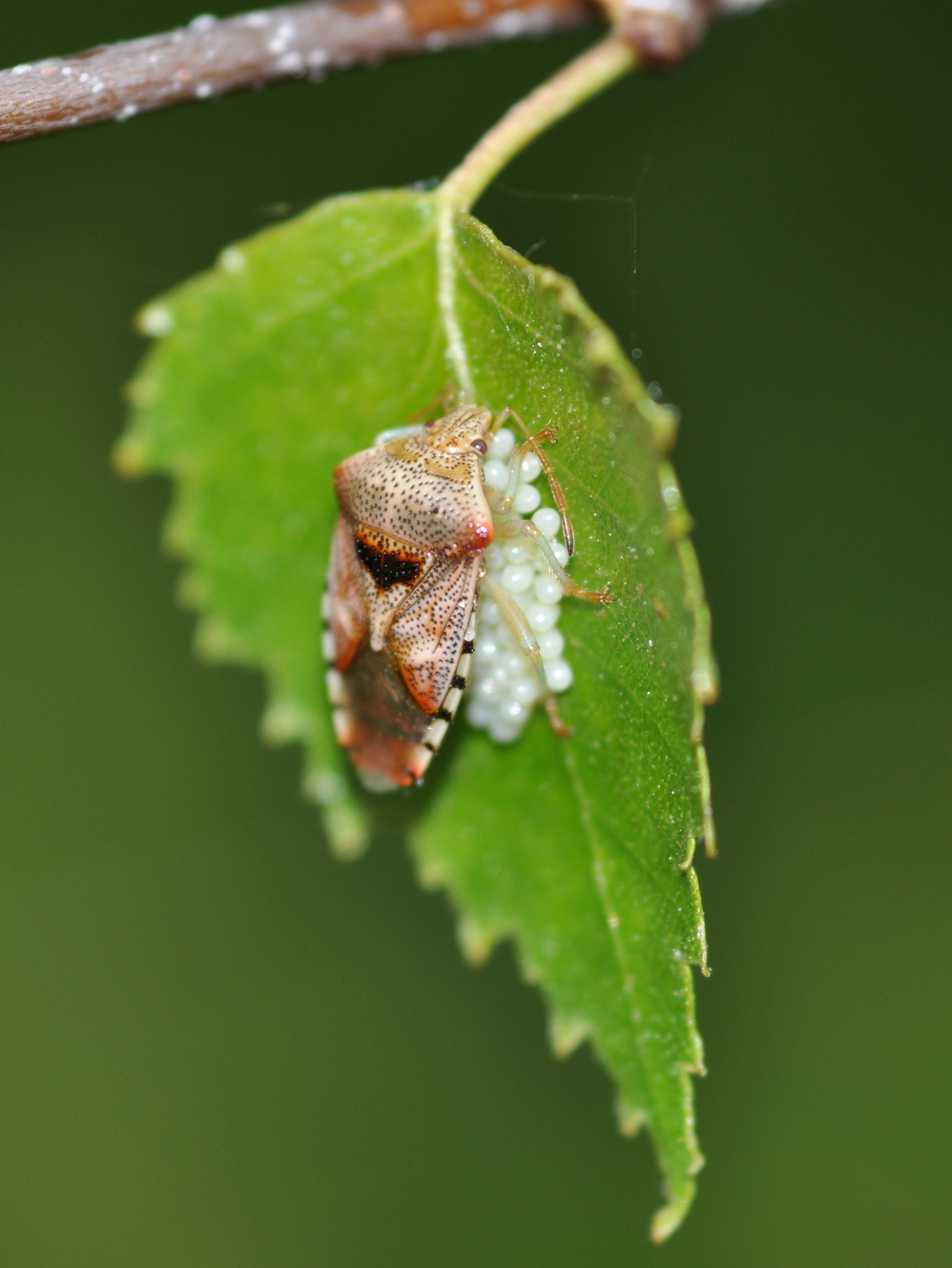 Fleckige Brutwanze Weibchen beim bewachen der Brut in Bahrenfeld, Hamburg.